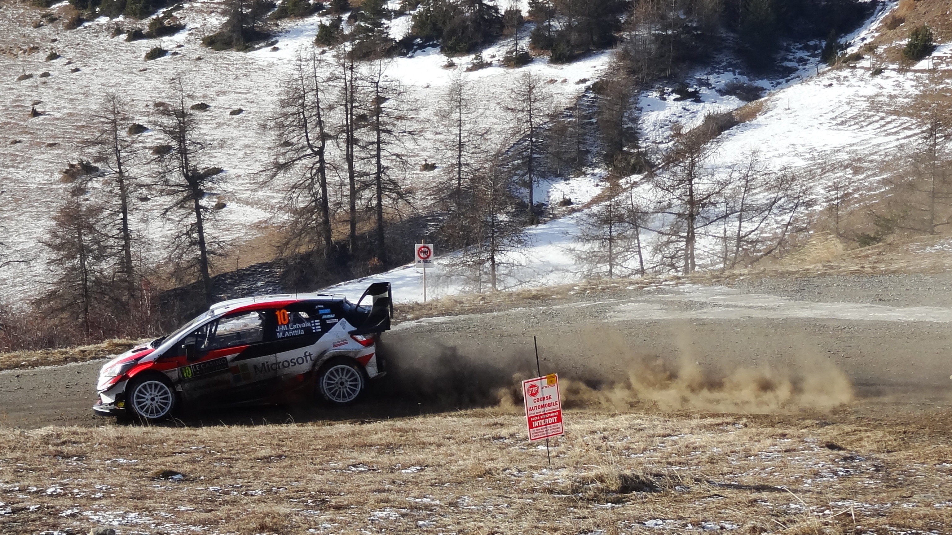 Toyota Yaris WRC de Jari-Matti Latvala au Rallye Monte-Carlo 2019.